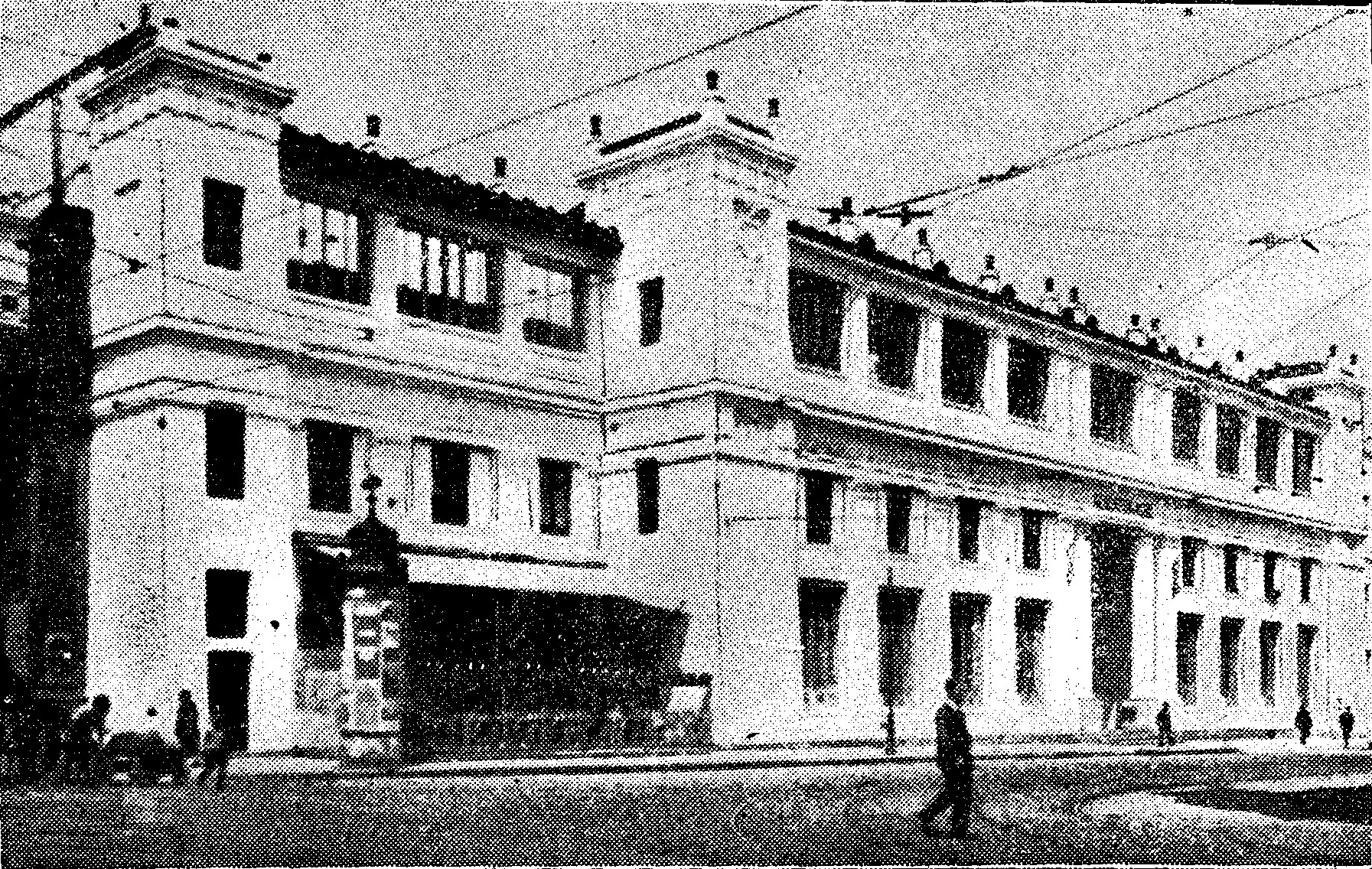 Berichterstattung zur Eröffnung der Wiener elektrischen Stadtbahn